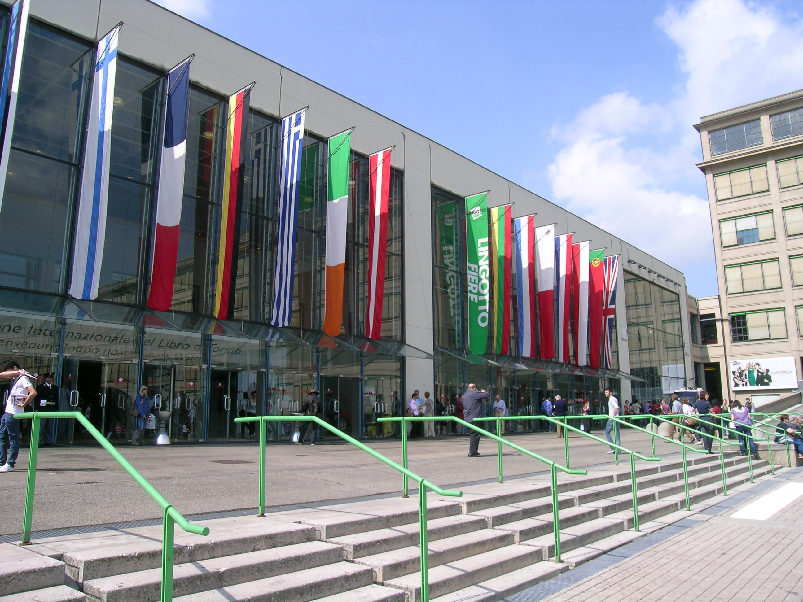 L'ingresso della Fiera